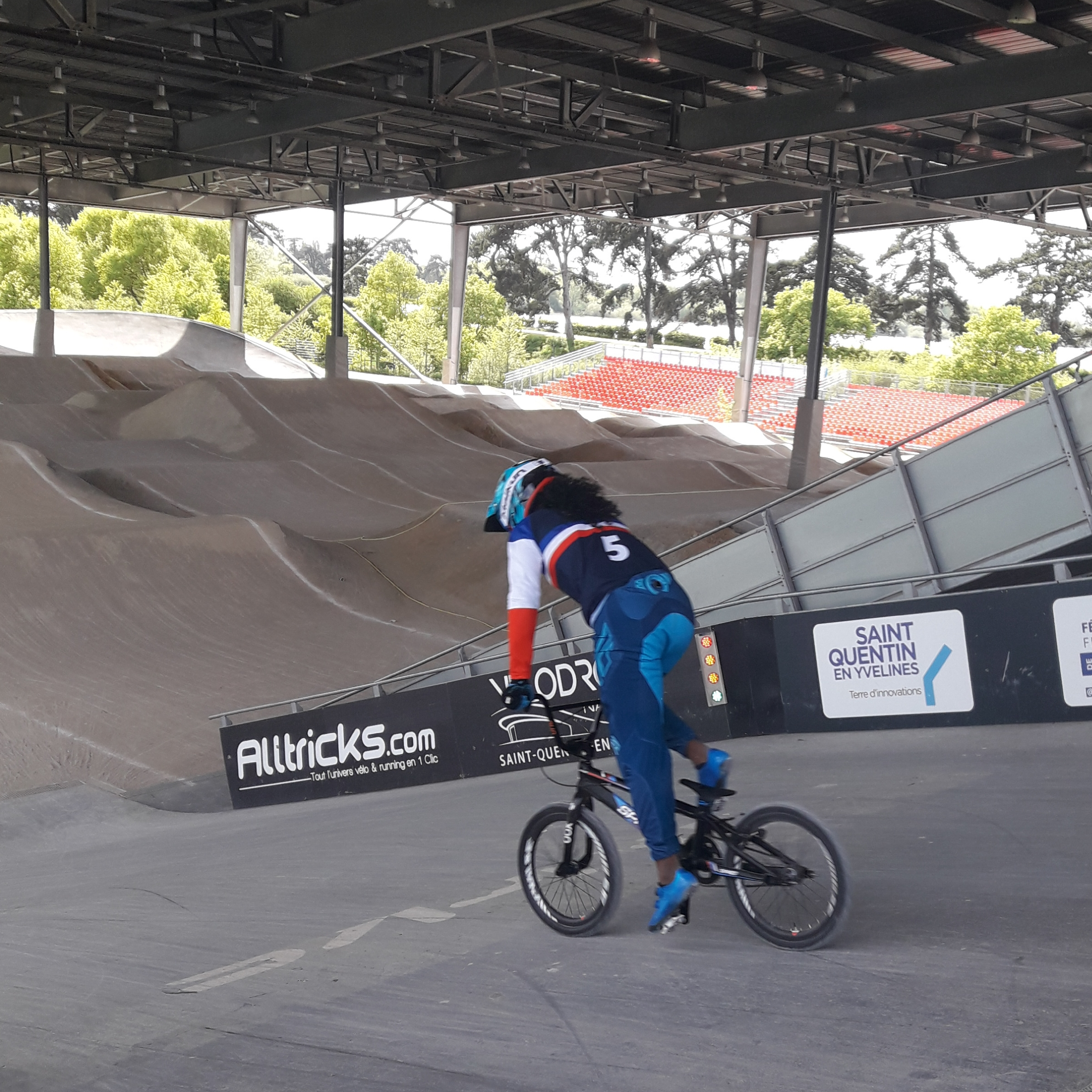 Axelle Etienne à l'entraînement au Vélodrome National de Saint-Quentin-en-Yvelines